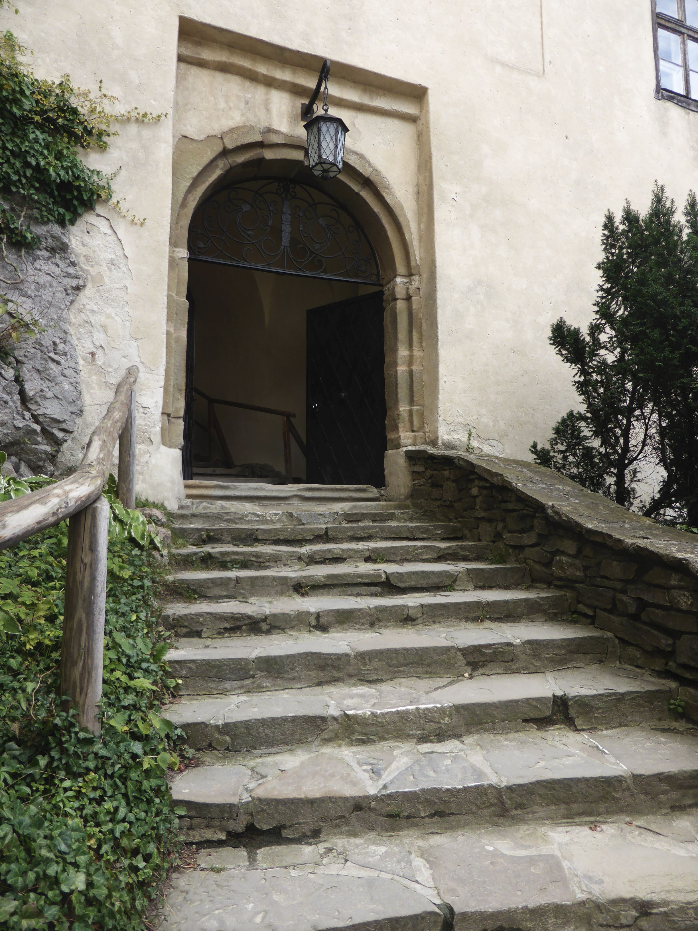 Niedzica Castle - Aufgang zu mittleren Burg